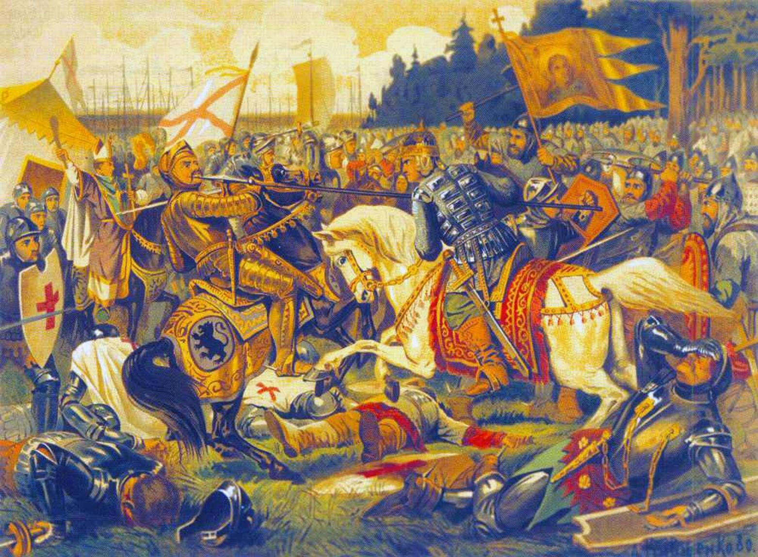 Это рисунок русского художника Алексея Кившенко, иллюстрирующая эпизод Невской битвы:«Князь Александр наносит рану шведскому военачальнику.